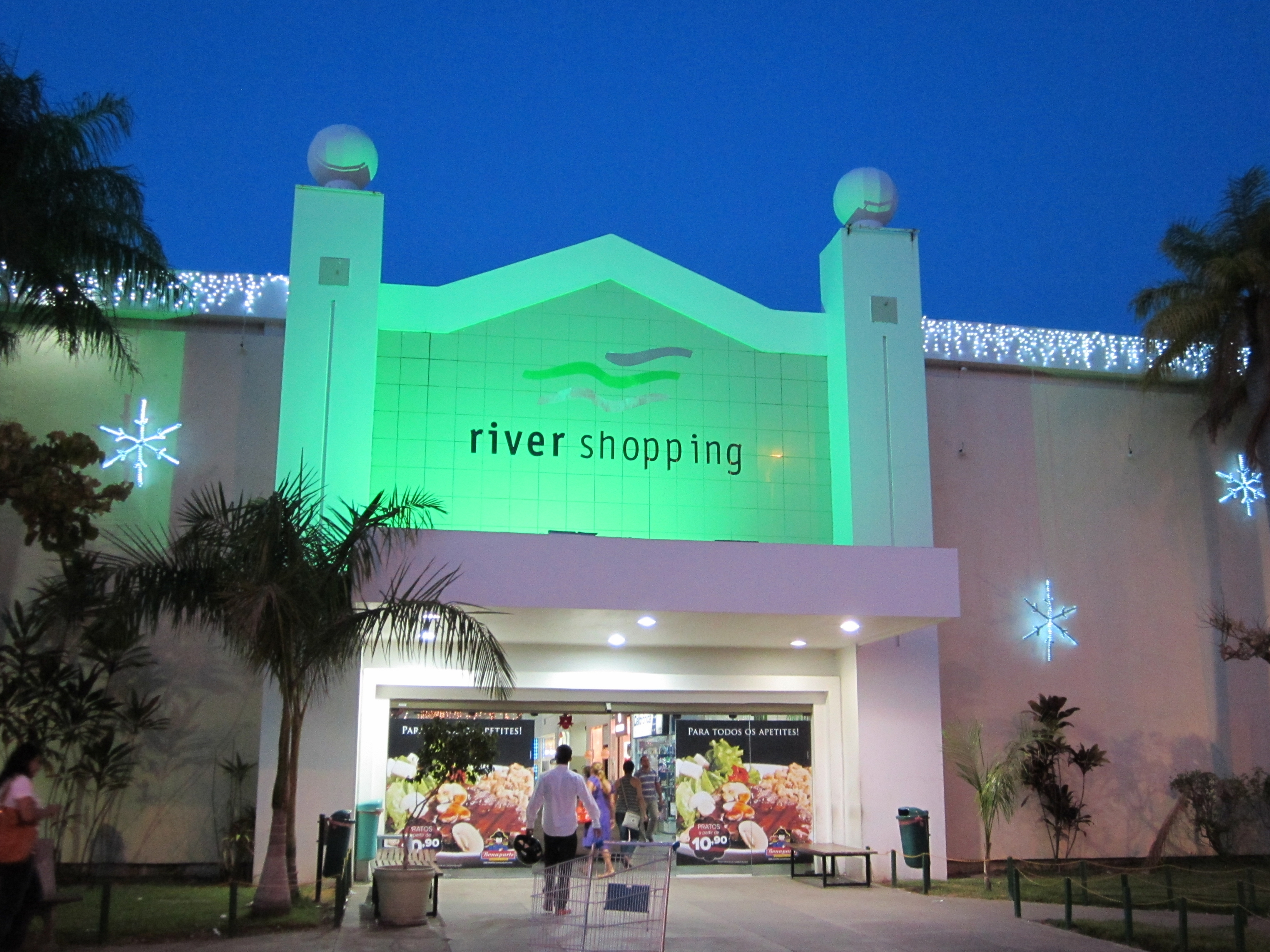 Entrada sul do River Shopping - Petrolina, Pernambuco, Brasil.